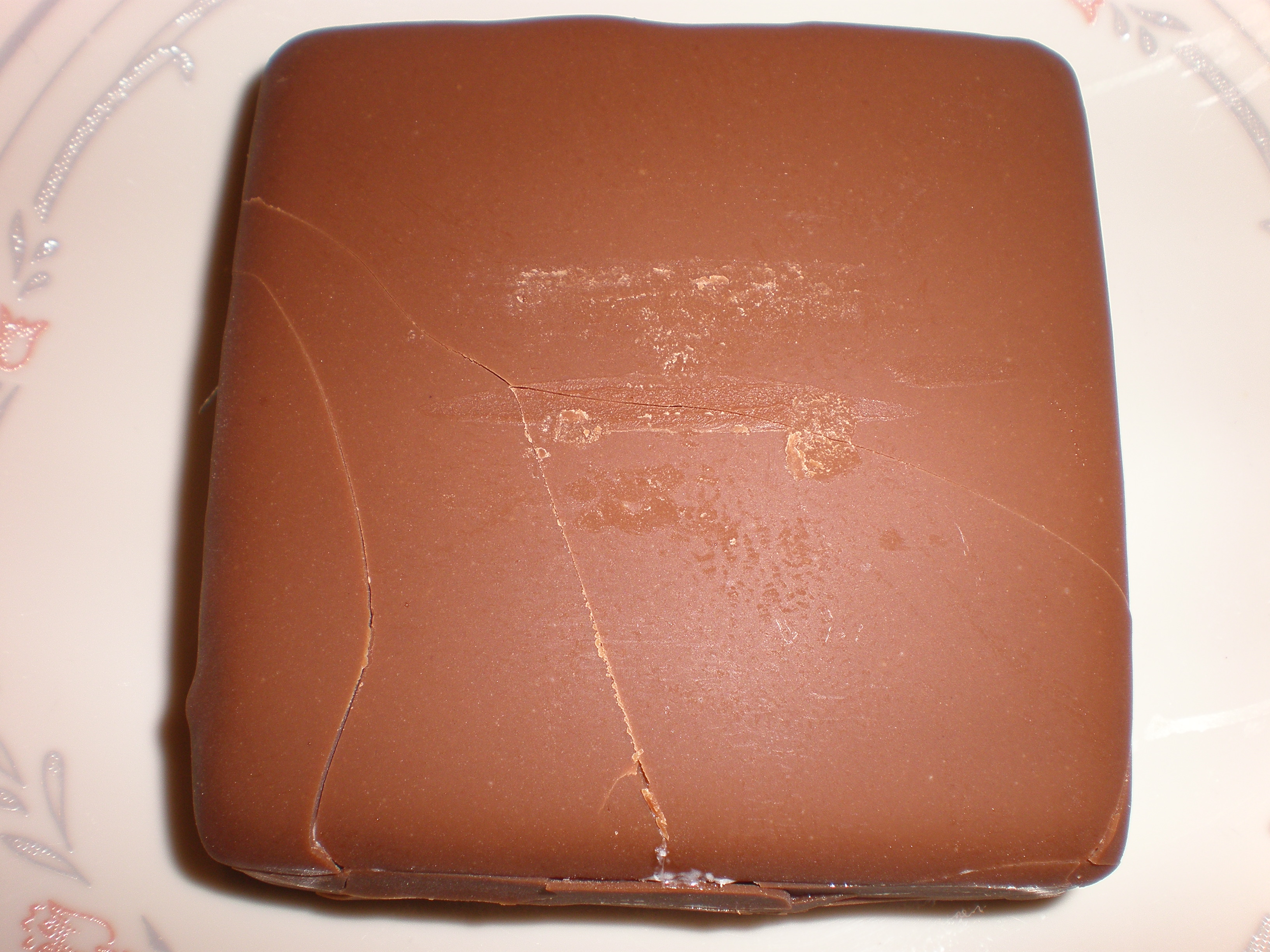 Original Klondike bar with vanilla filling